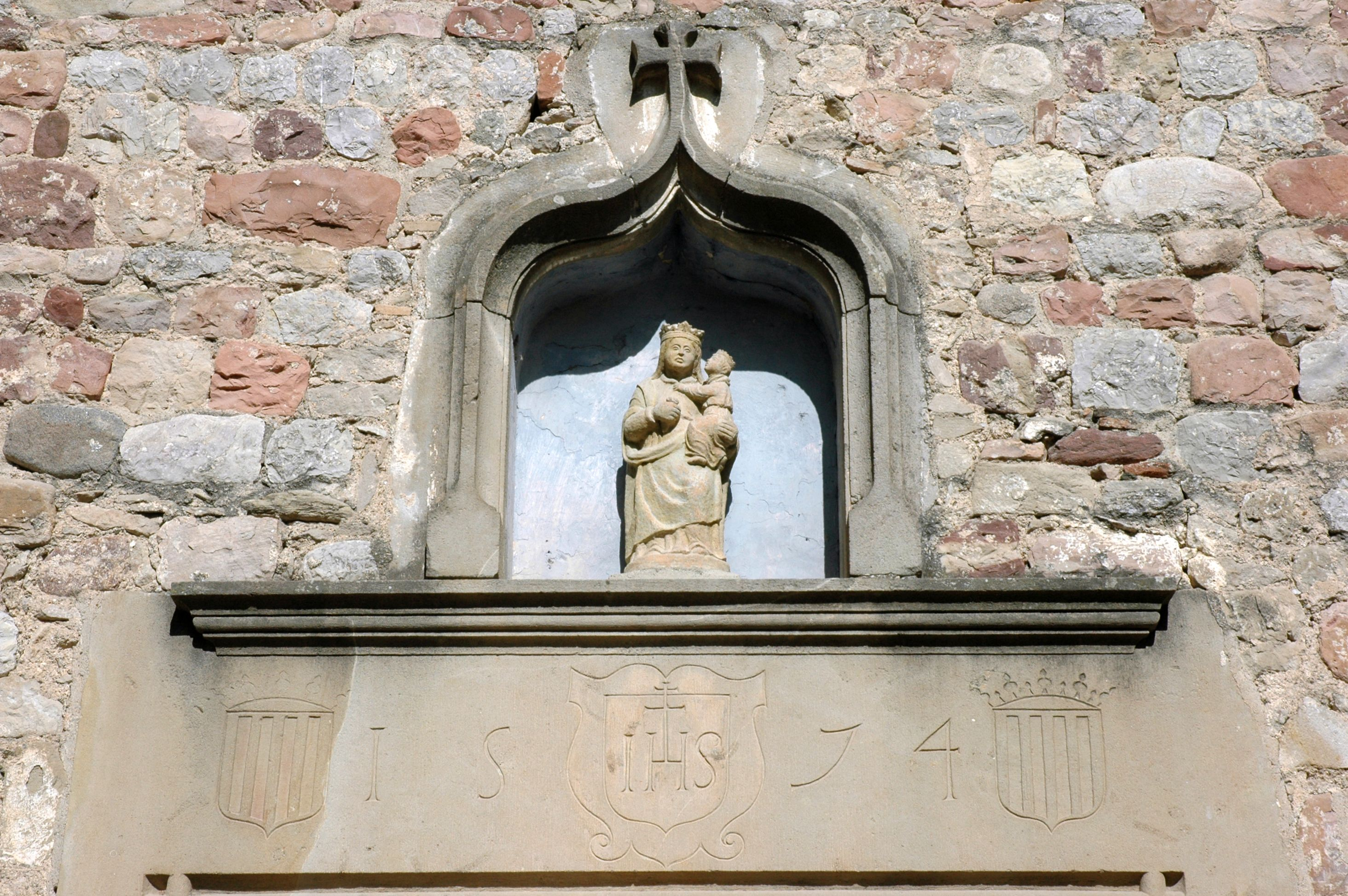 Santa Maria de Santiga - Detall porta